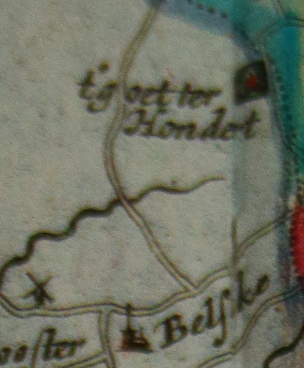 t'goet ter Hondert (Hof van Oranje), Atlas Maior, Joan Blaeu, 1665.